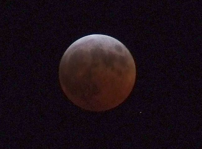 Totale Mondfinsternis am 3.3.2007 von Augsburg aus fotografiert um 23:53 Uhr. Fotograf: User:Neitram